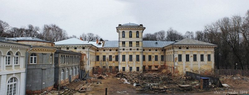 Сядзібны комплекс Булгакаў "Добасна"